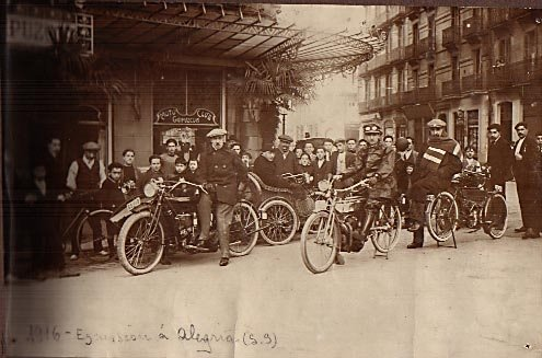 Excursión a Alegria. 1916